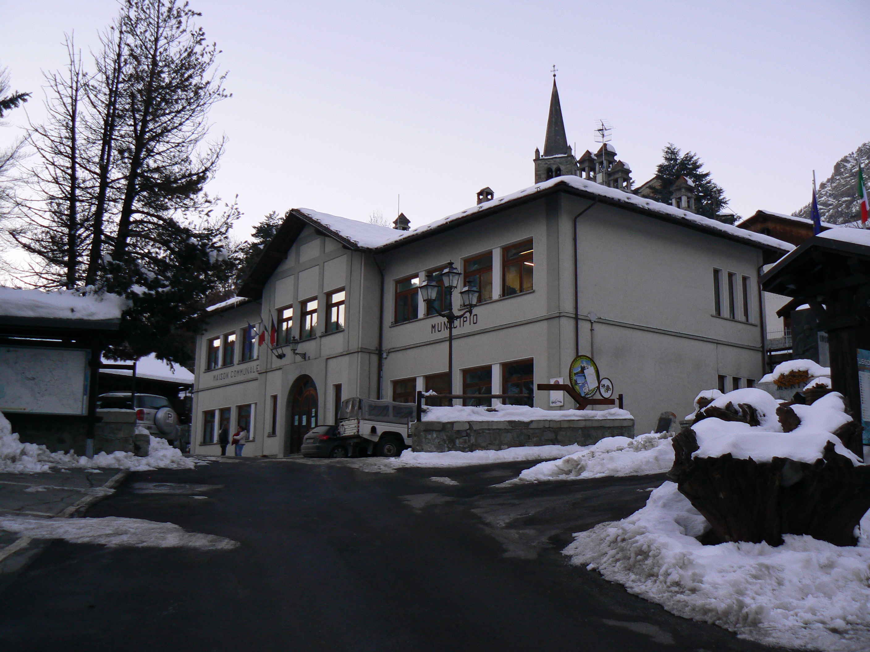 Brusson, Valle d'Aosta, Italia. Municipio